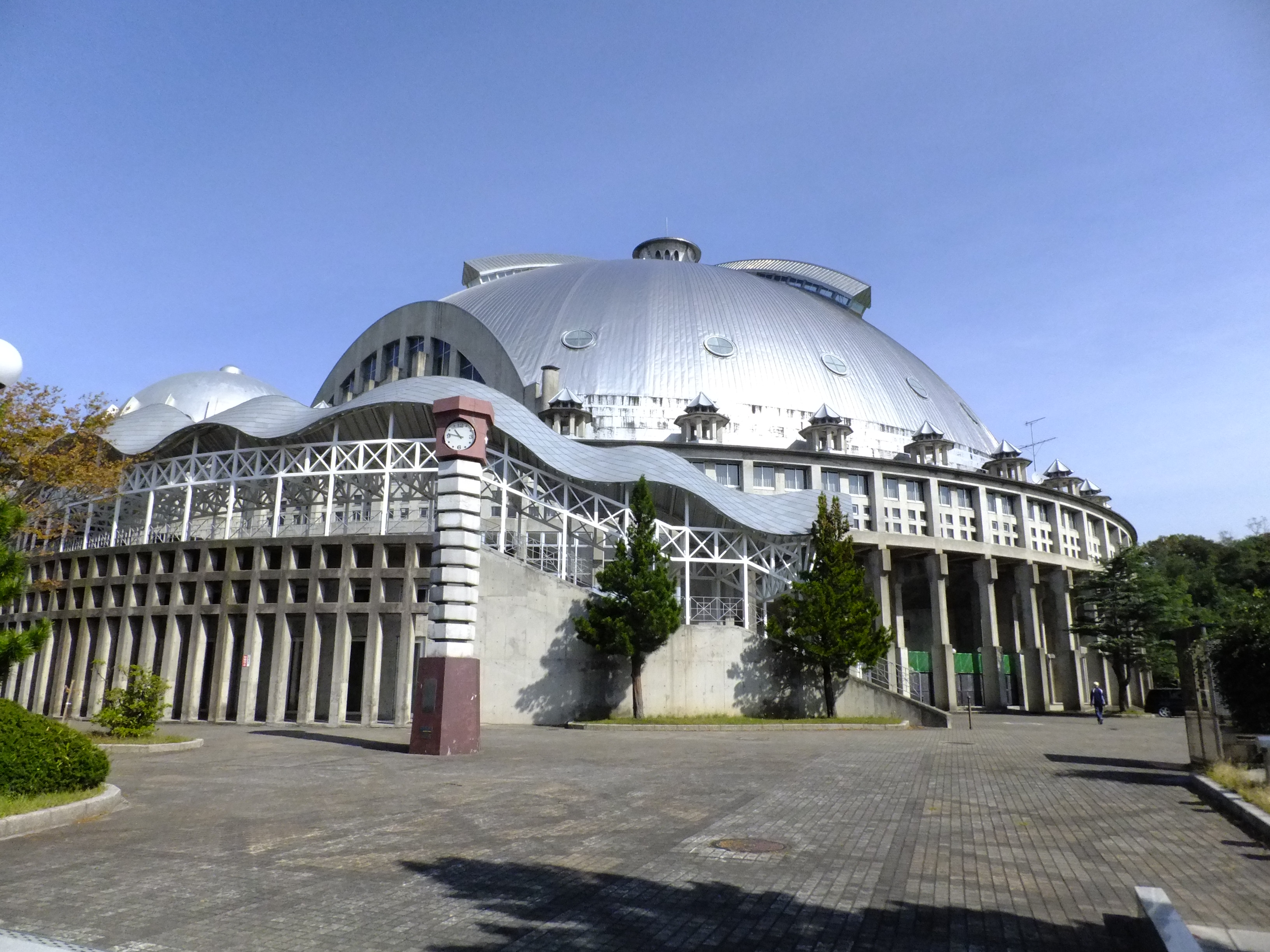 秋田県秋田市八橋本町、秋田市立体育館